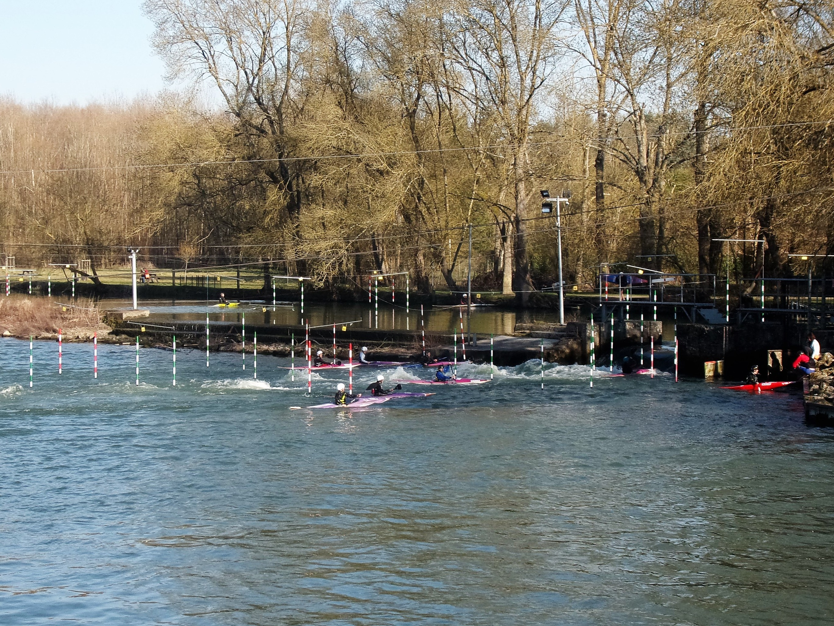 Aménagement pour canoës et kayaks sur l'Indre à Veigné.